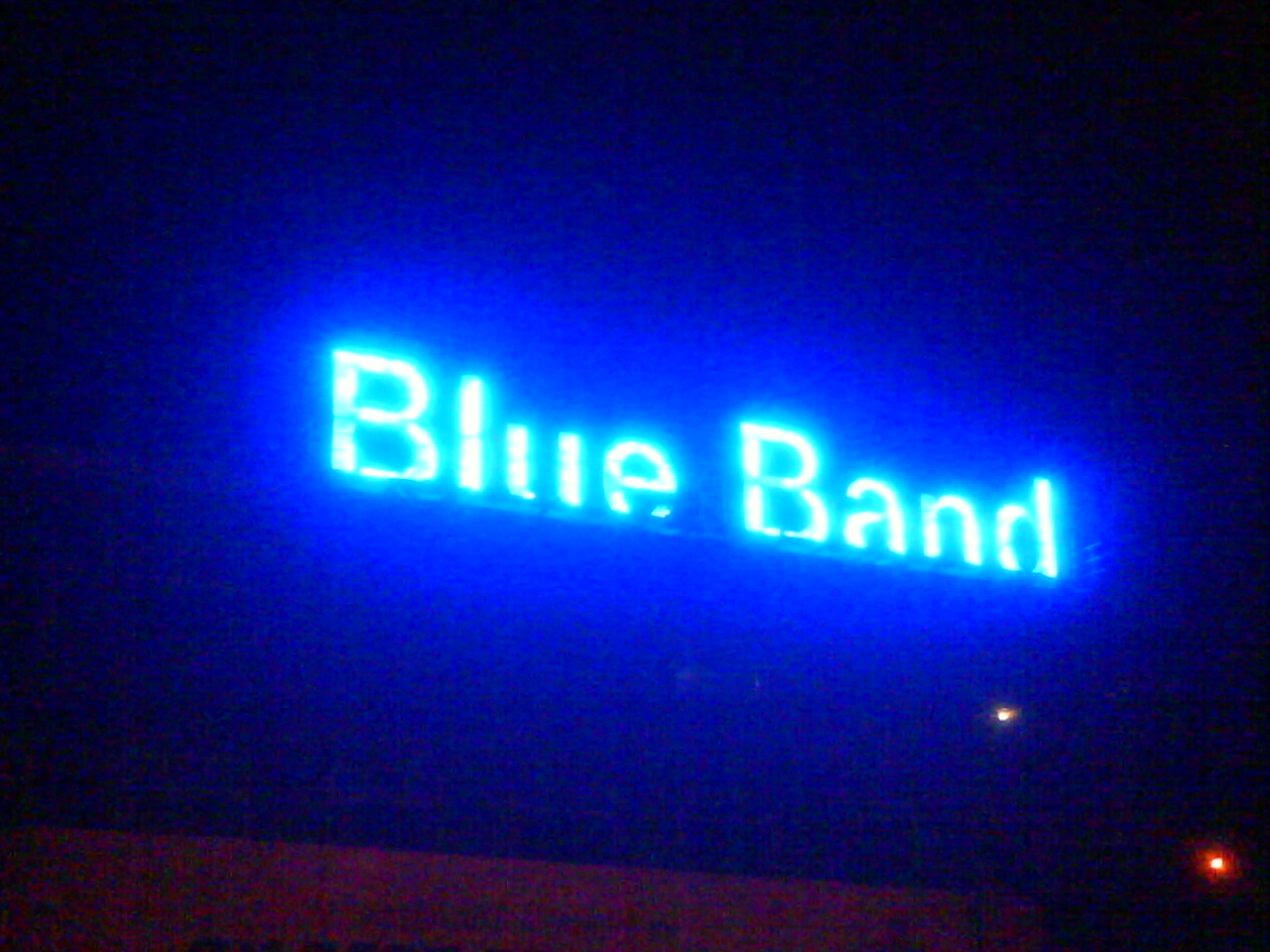 Blue Band reclamebord (te zien vanaf rechtermaasoever in Rotterdam)